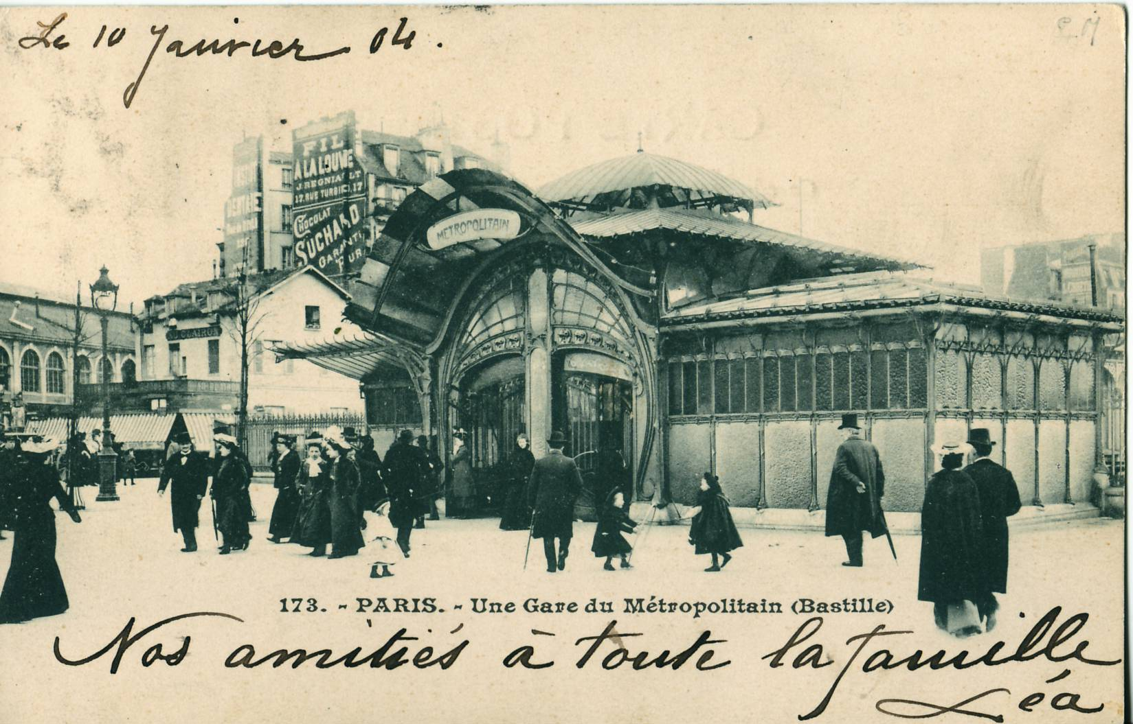 Carte postale ancienne sans mention d'éditeur, n°171 : PARIS - Une Gare du Métropolitain (Bastille)